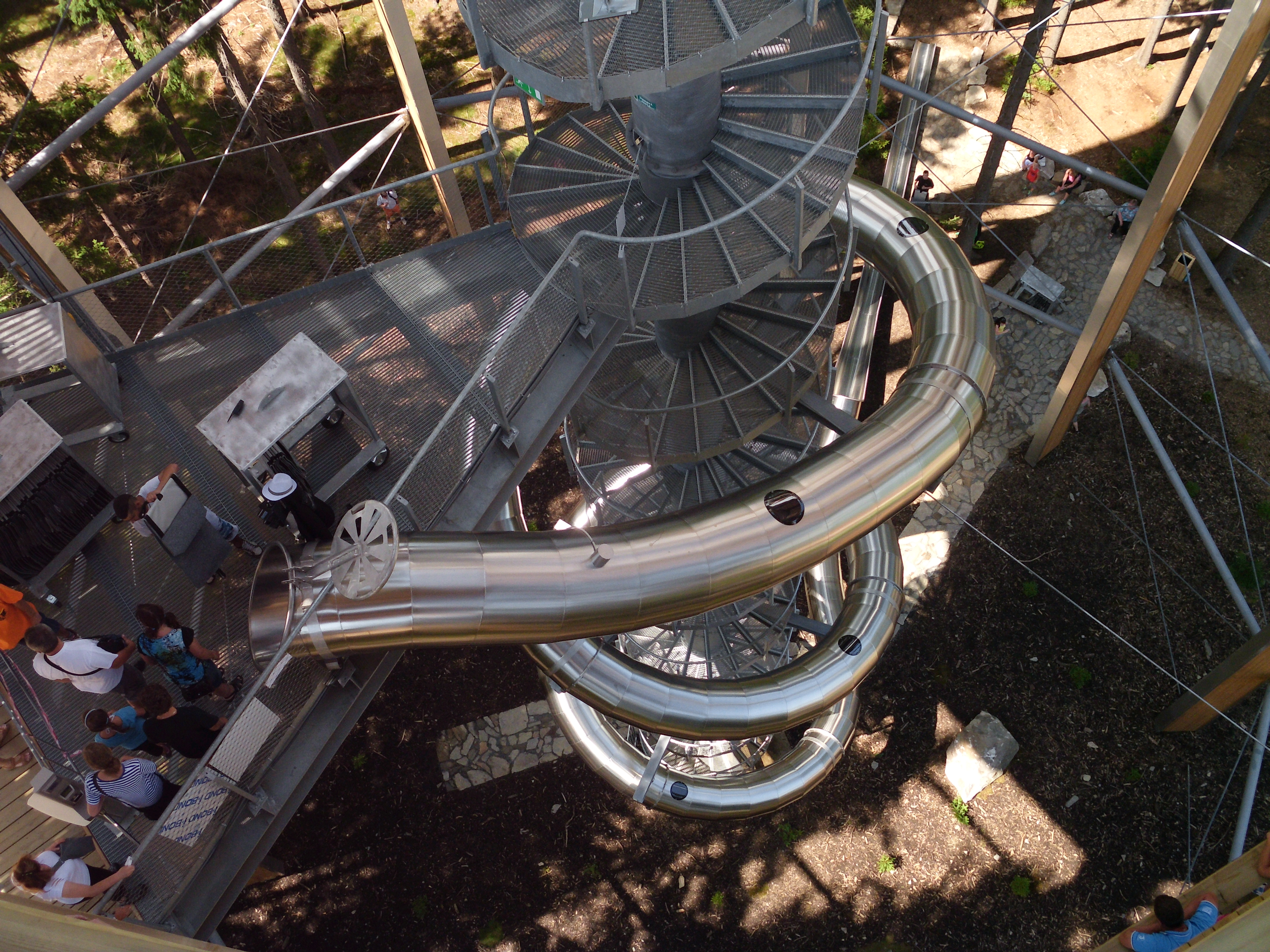 Tobogán :-)